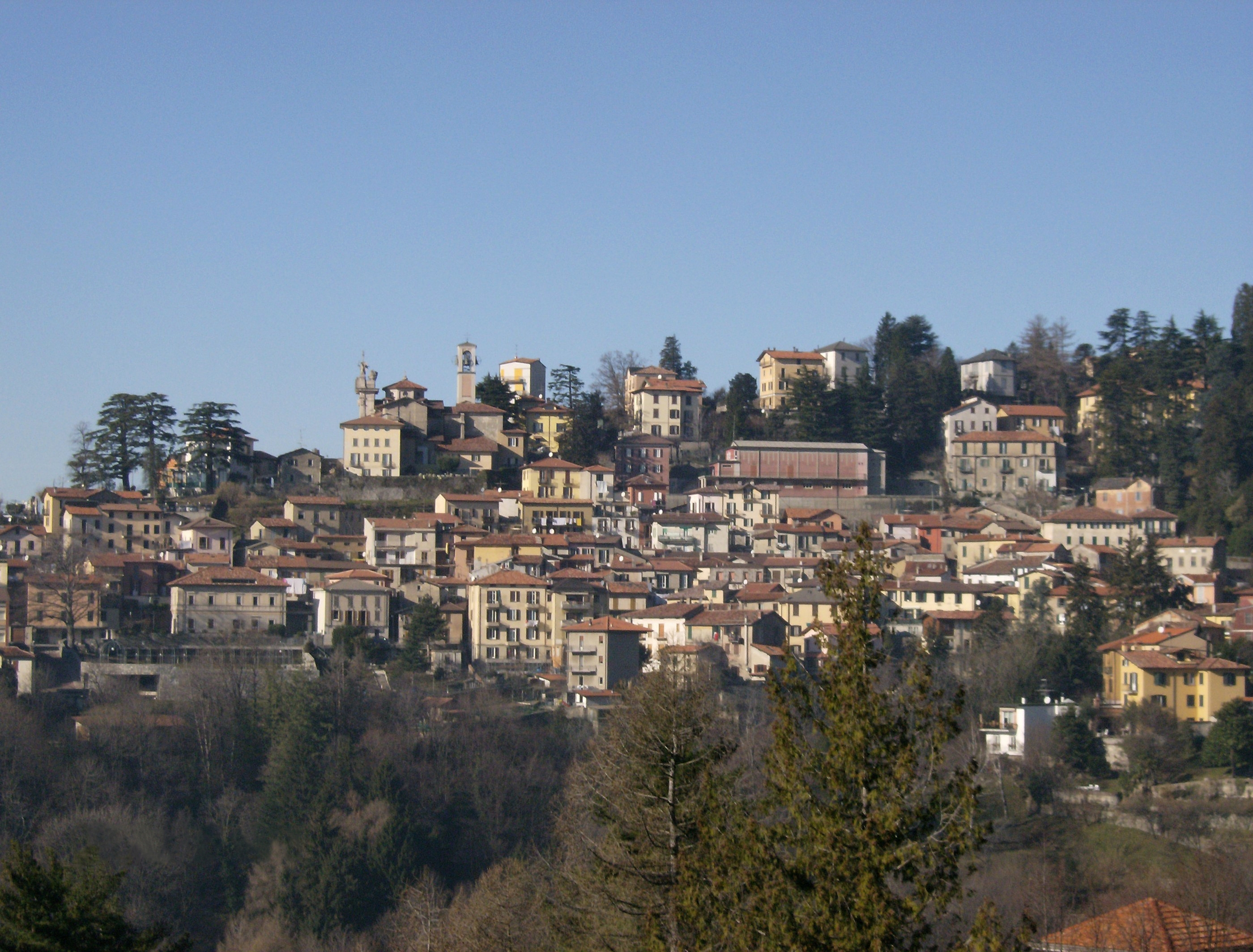 Panorama di Brunate